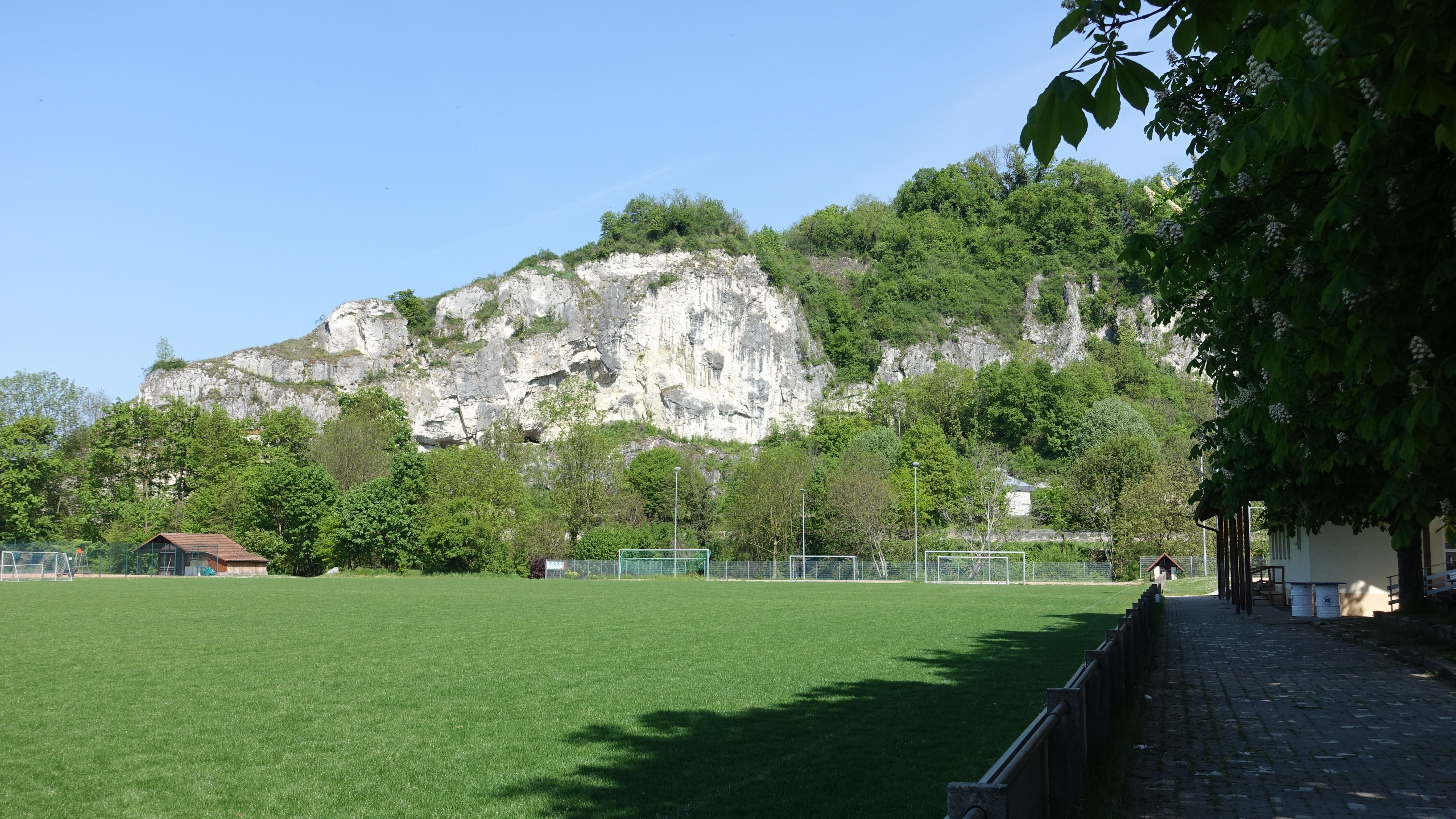 Efringen-Kirchen - Isteiner Klotz